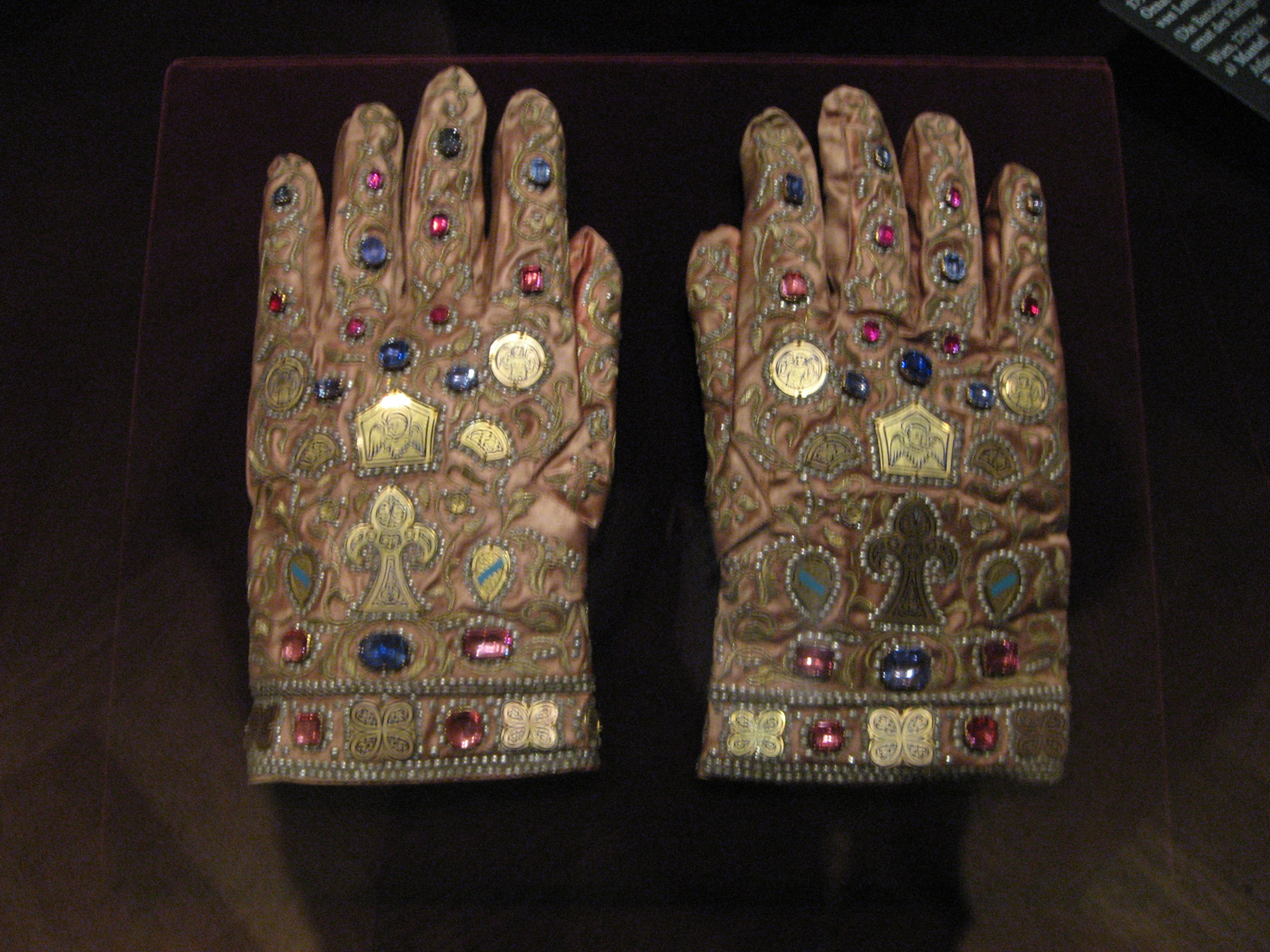 Ornat des Kaisers Franz Stephan I. von Lothringen. (Die Barockkopien nach dem Krönungsornat des Heiligen Römischen Reiches). Wien, 1763/64. Handschuhe. Atlas, Goldstickerei, Goldemail, Edelsteine. Inv. Nr. XIV 110.